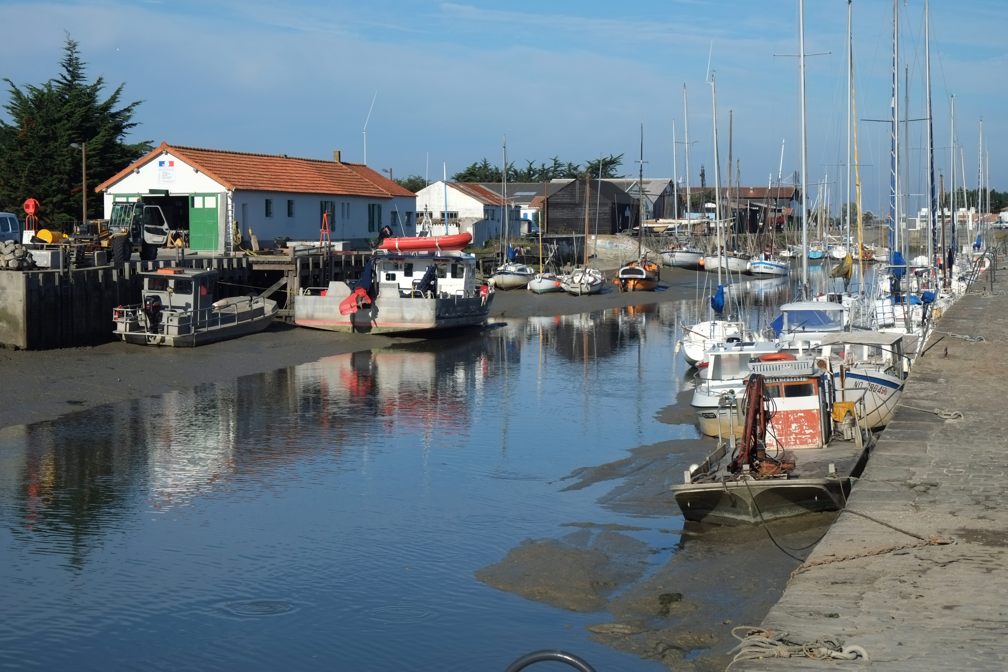 Port de Noirmoutier-en-l'Île Île de Noirmoutier Vendée France